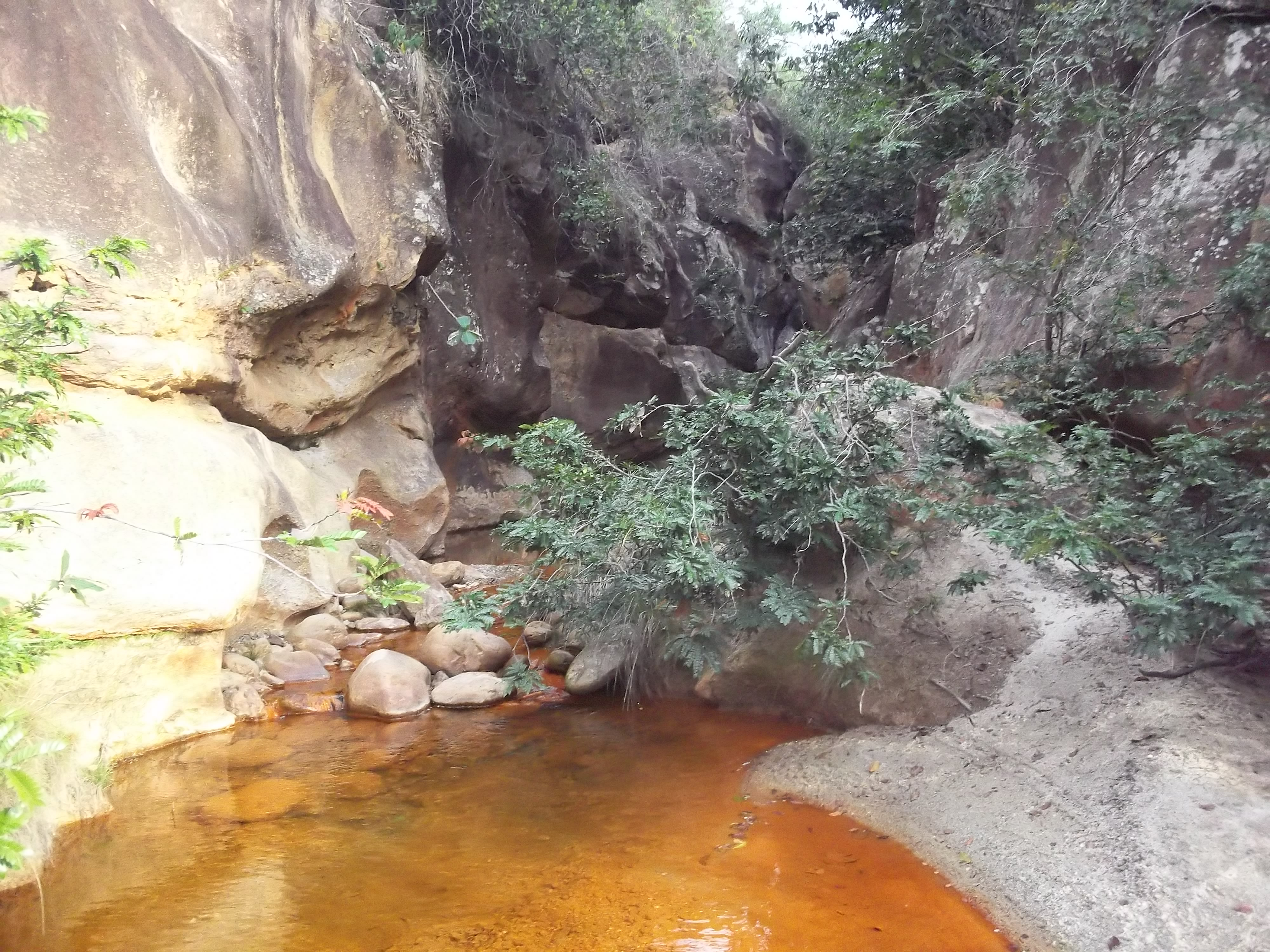 manantial de gran importancia hídrica y ecológica